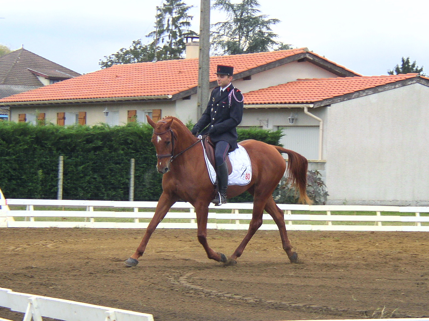 épreuve de dressage d'un concours complet d'équitation